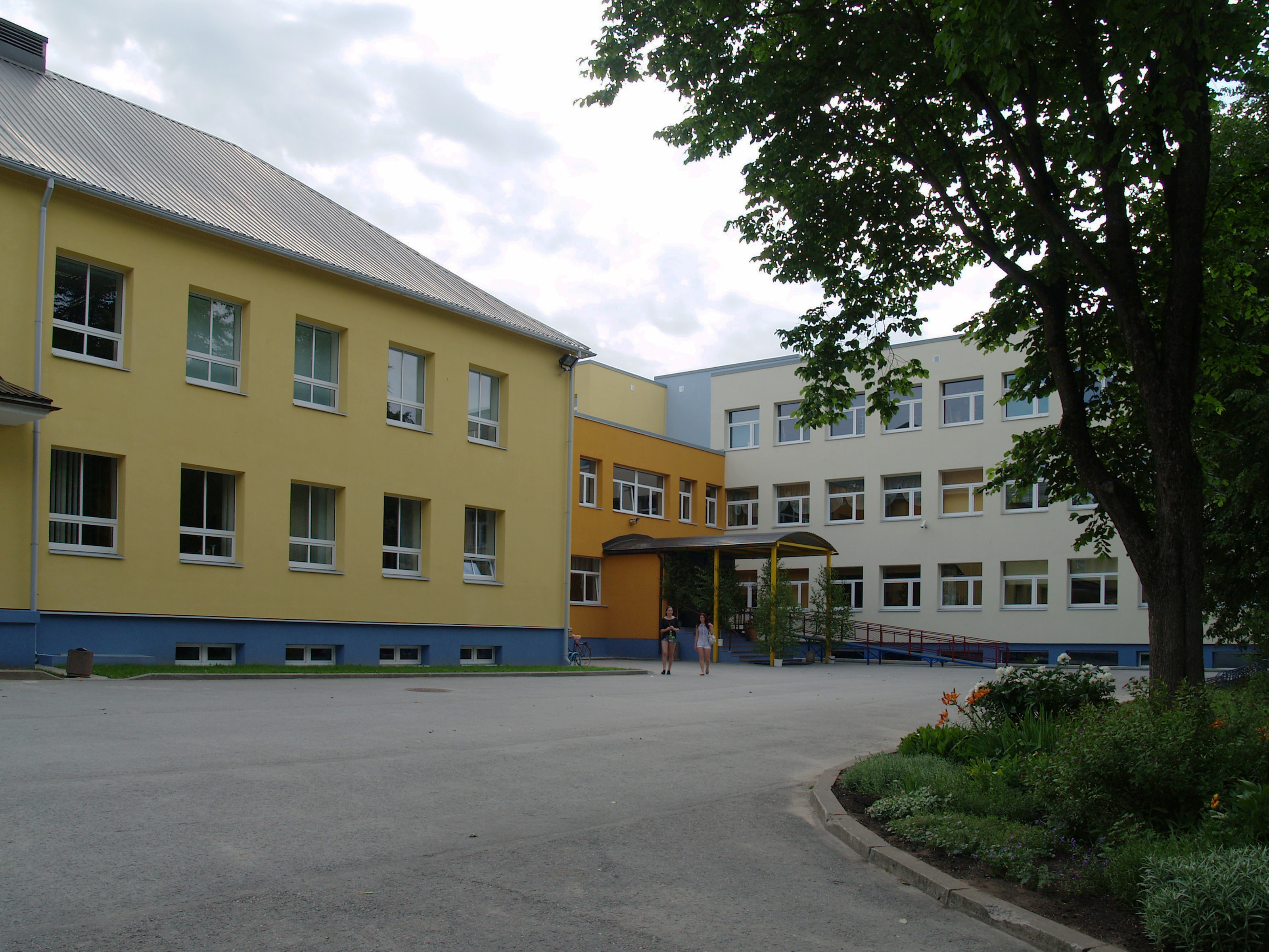 Kose Gümnaasiumi peasissepääs 2013. aastal.